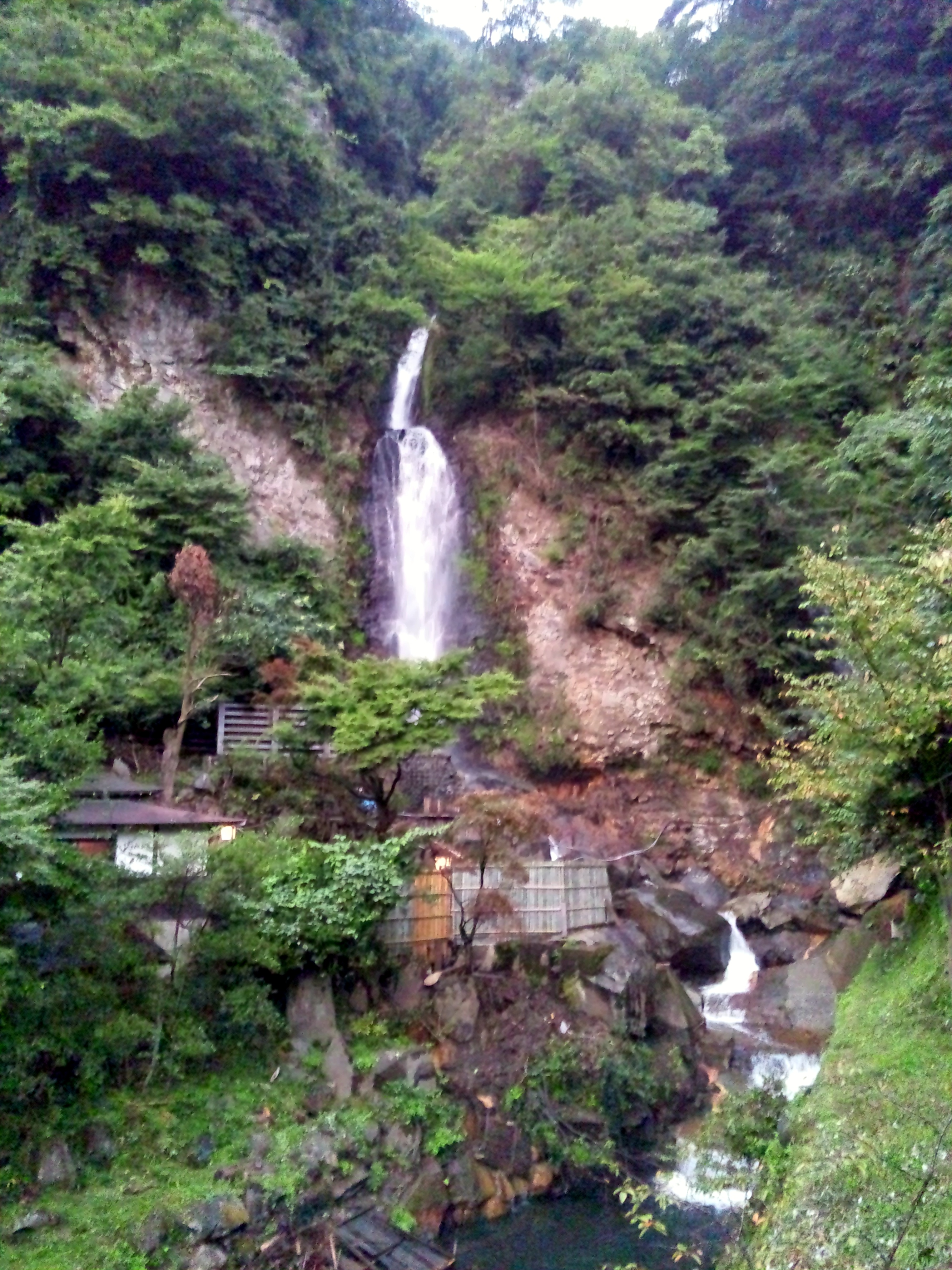 熊本県南阿蘇村にある金龍の滝 (Kinryu Falls)